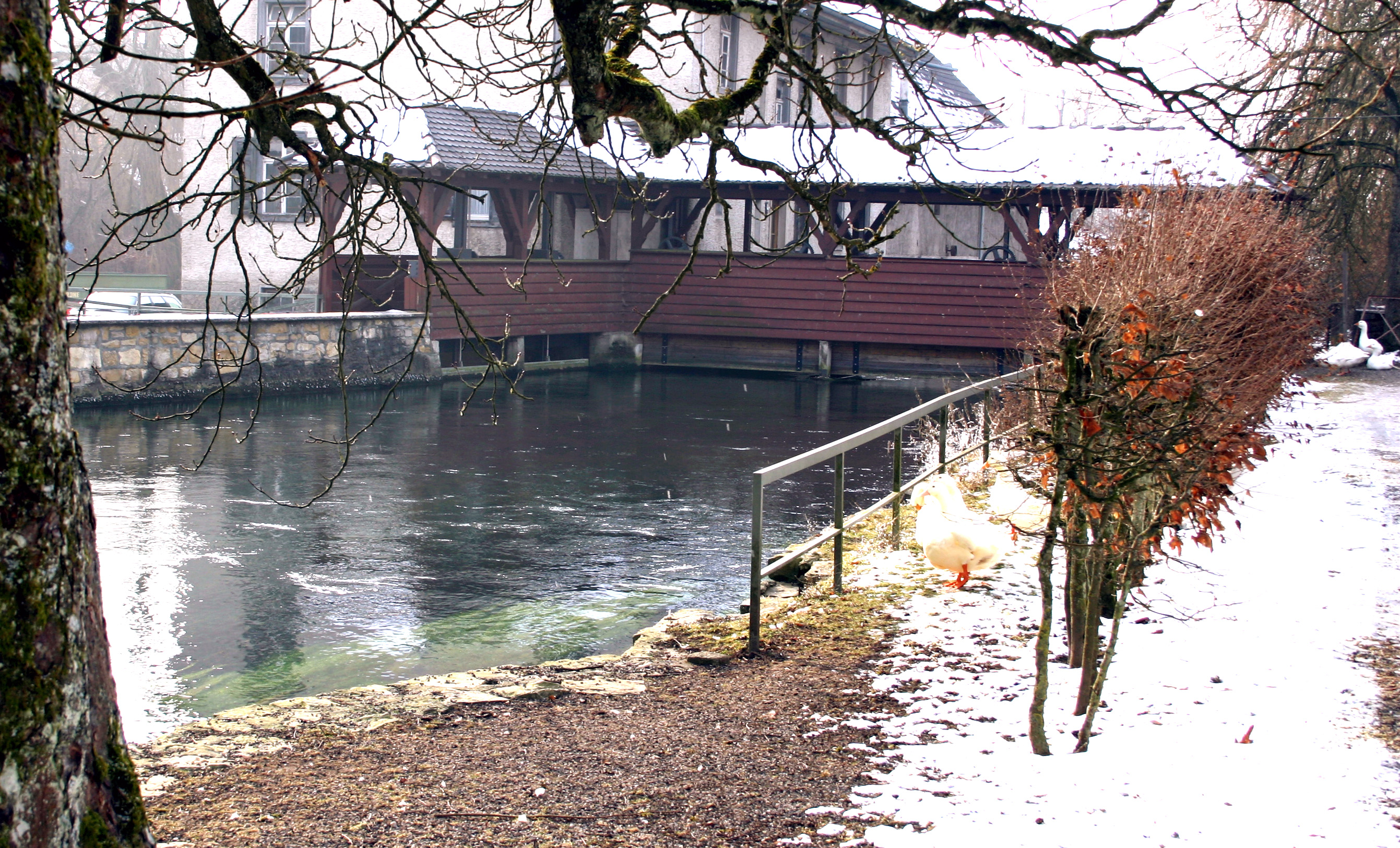 Radolfzeller Aach Millewier.